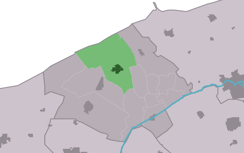 Kaartsje fan himrik fan Ferwert